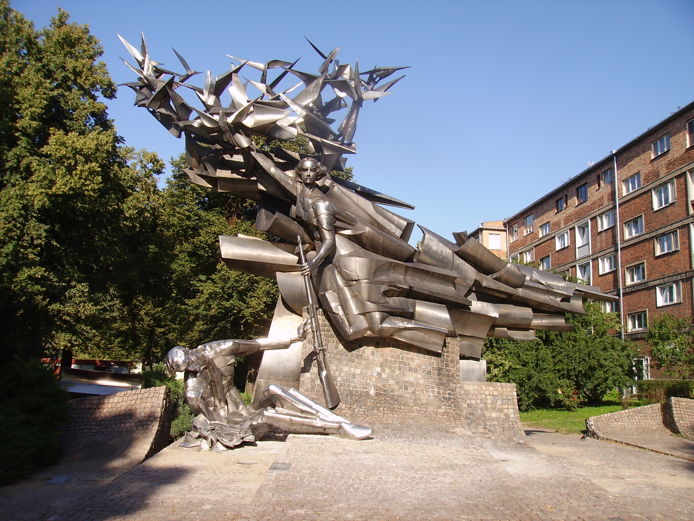 Denkmal vor der polnischen Post in Danzig